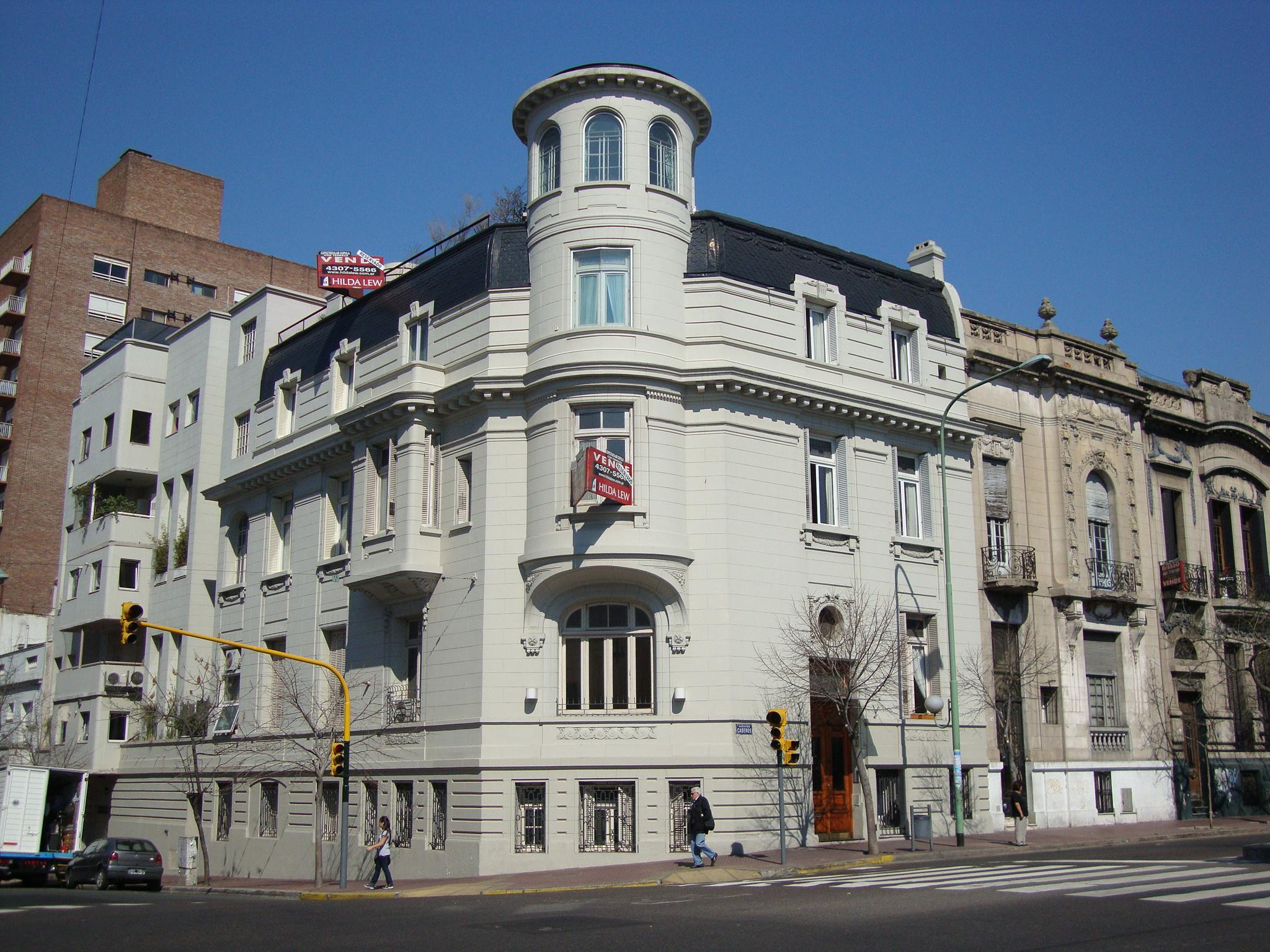 Edificio de departementos en Avenida Caseros y Bolívar. Buenos Aires, Argentina.